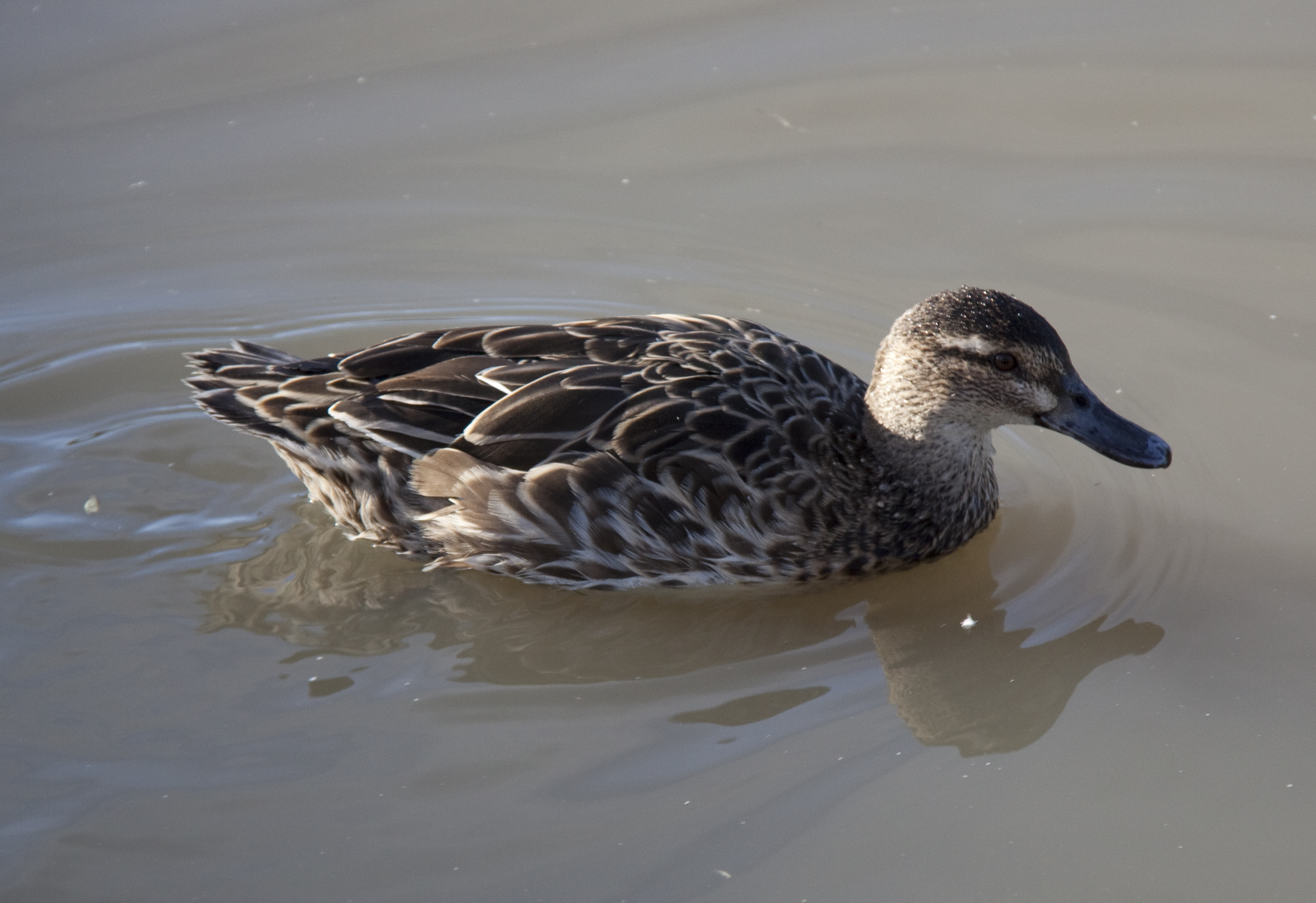 Female Garganey Anas querquedula